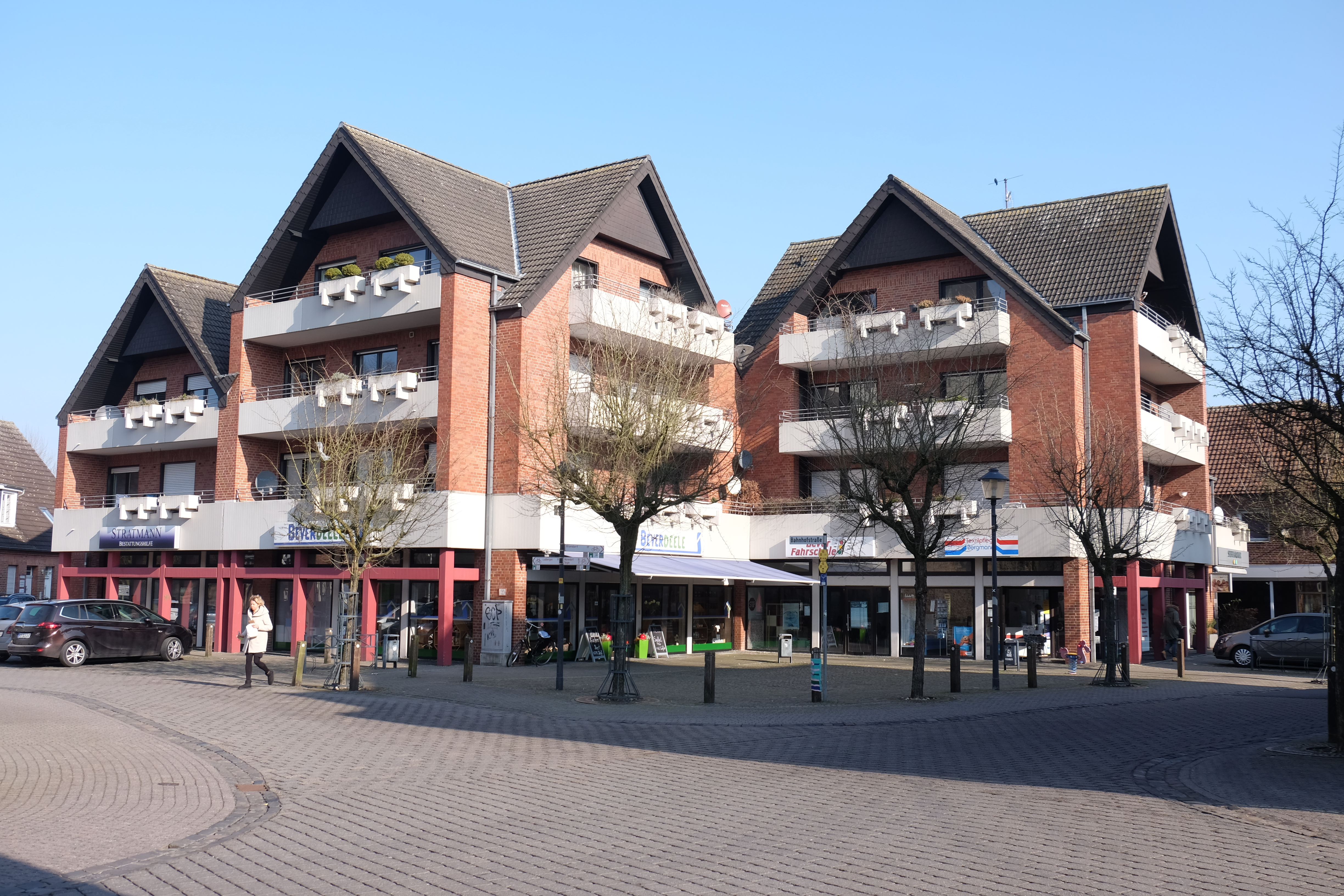 Die Sachsenrast in Ostbevern